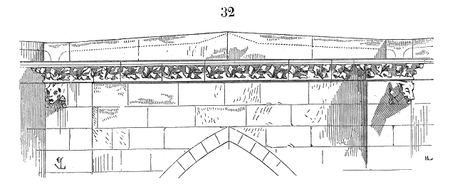 1...Le cloître de la cathédrale de Toul, commencé vers 1240 et terminé à la fin du XIIIe siècle, nous donne une jolie décoration de ce genre, consistant en une suite d'arcatures trilobées, sous chacune desquelles était sculpté un petit bas-relief porté sur une sorte de tablette ornée peu saillante...